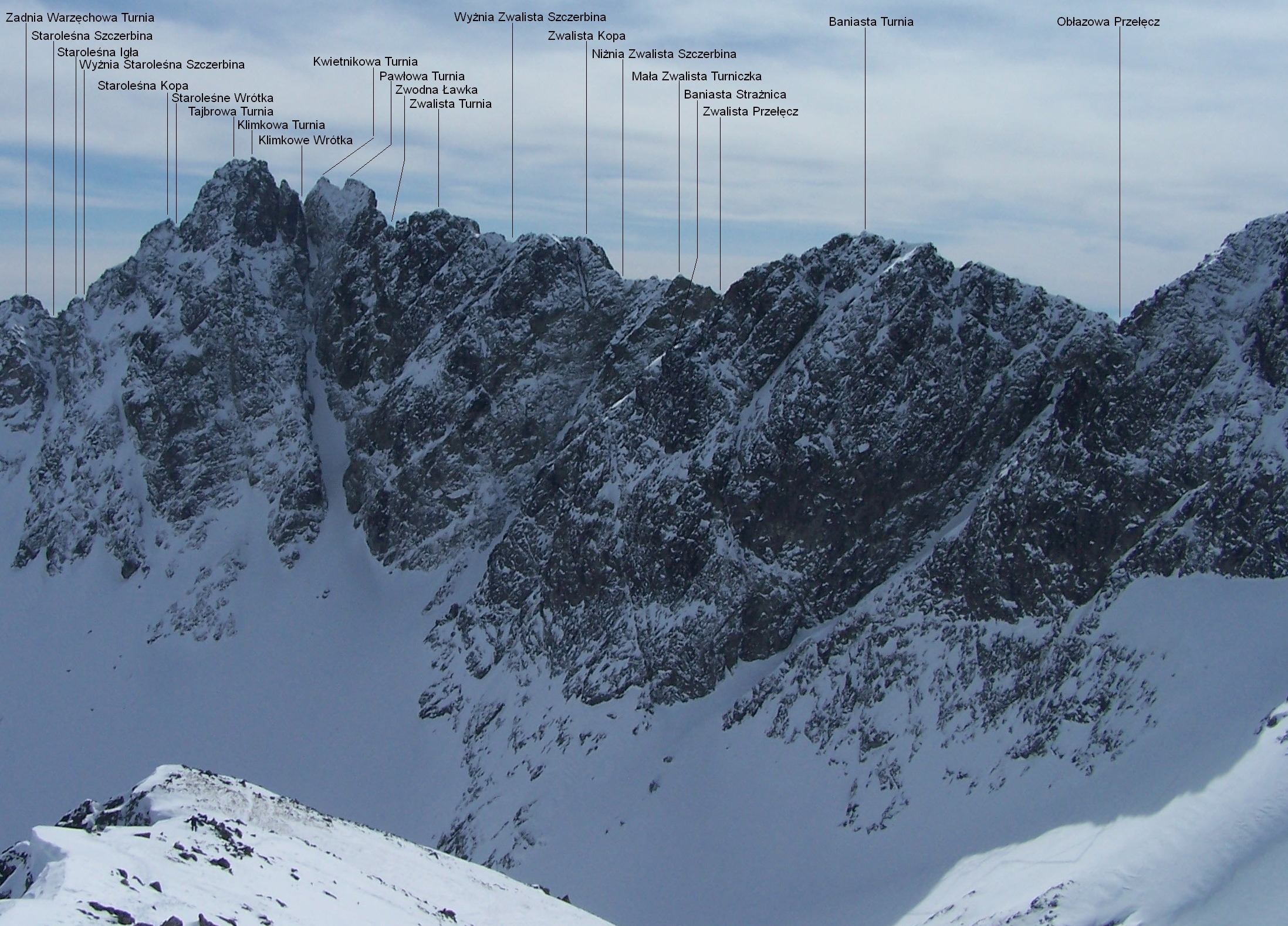 Widok ze Świstowego Szczytu na grań Staroleśnego Szczytu